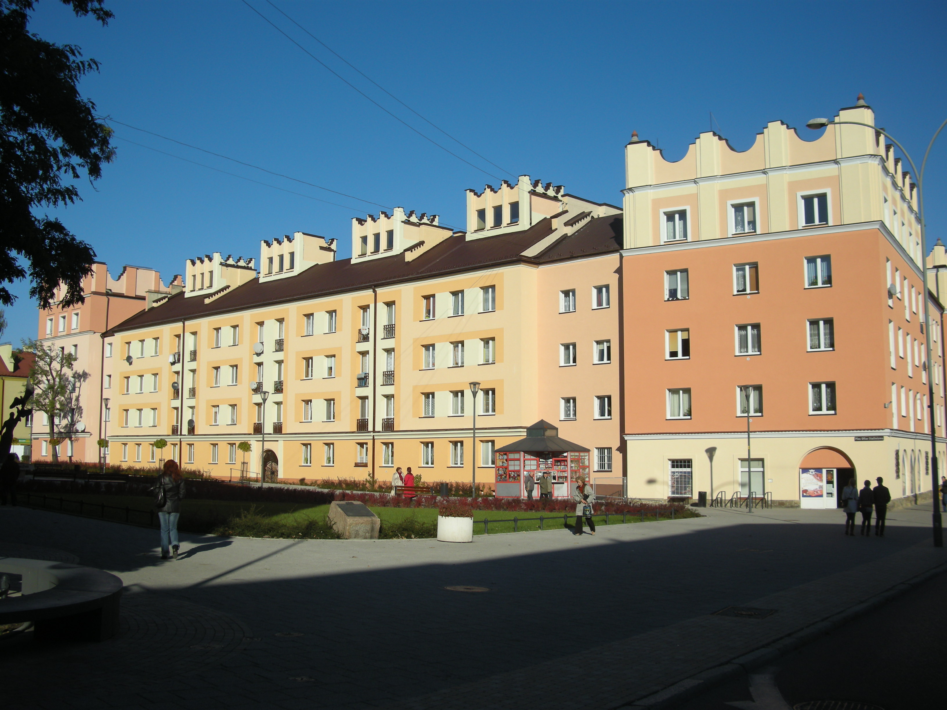 Zespół bloków z lat 50. XX w. przy pl. Ofiar Stalinizmu.